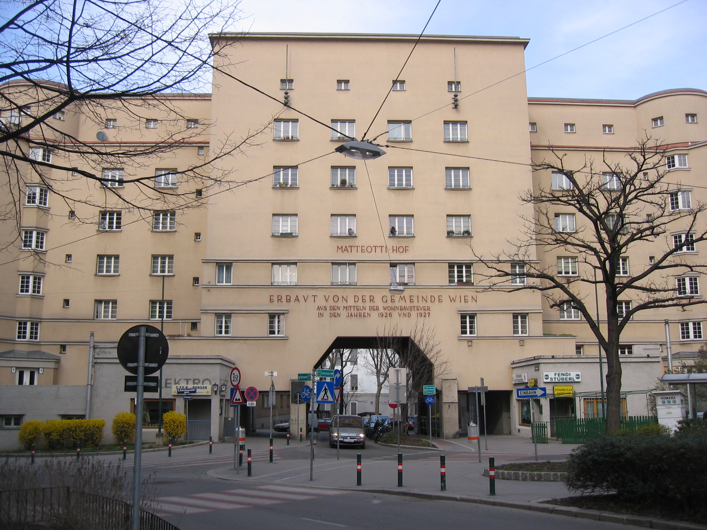 Matteottihof in Wien Margareten, Blickrichtung Fendigasse